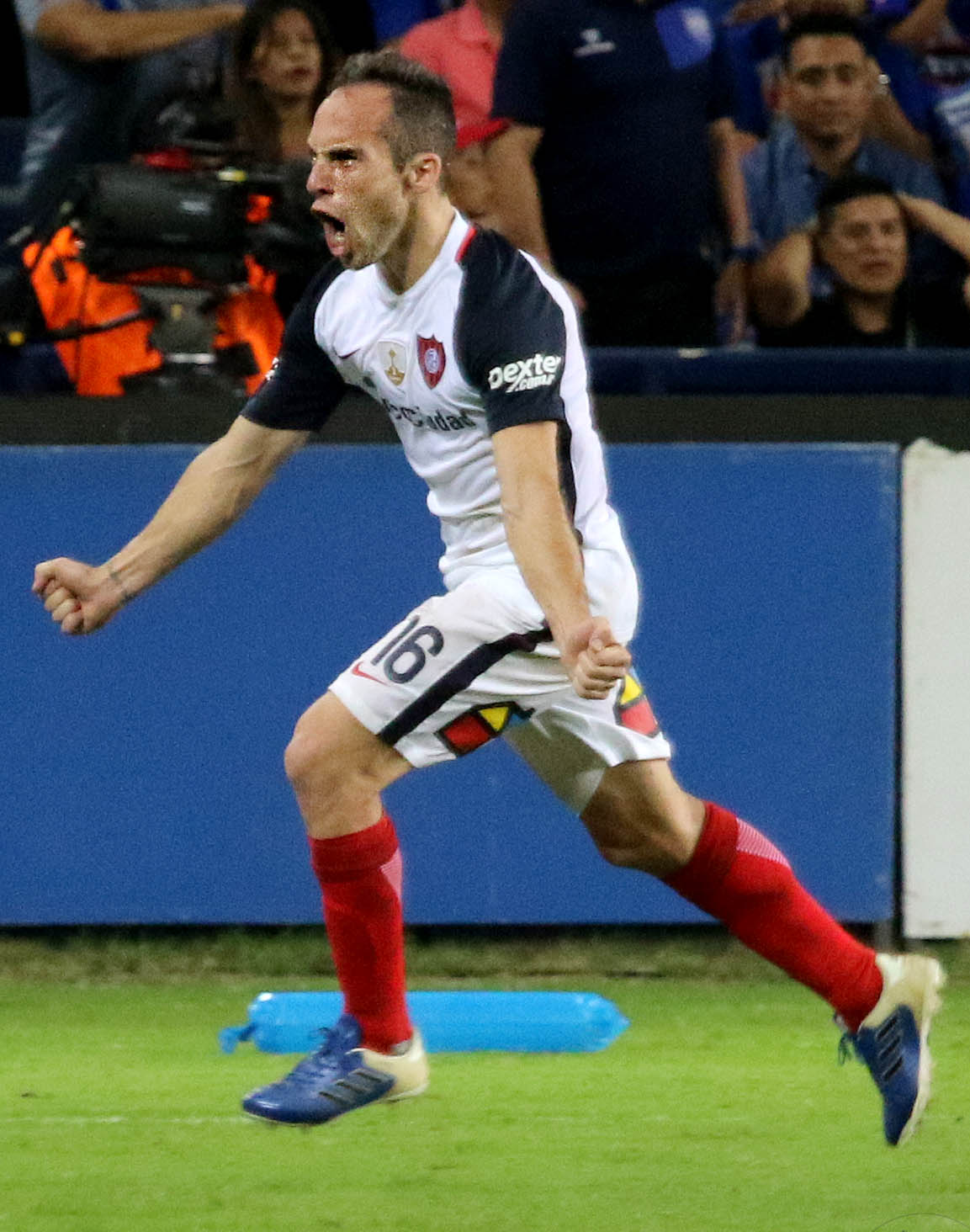 Guayaquil, jueves 06 de julio del 2017 (Andes).-Emelec enfrenta a San Lorenzo por los octavos de final de la Copa Libertadores, El partido se disputa en el estadio Capwell. Foto:Andes/César Muñoz